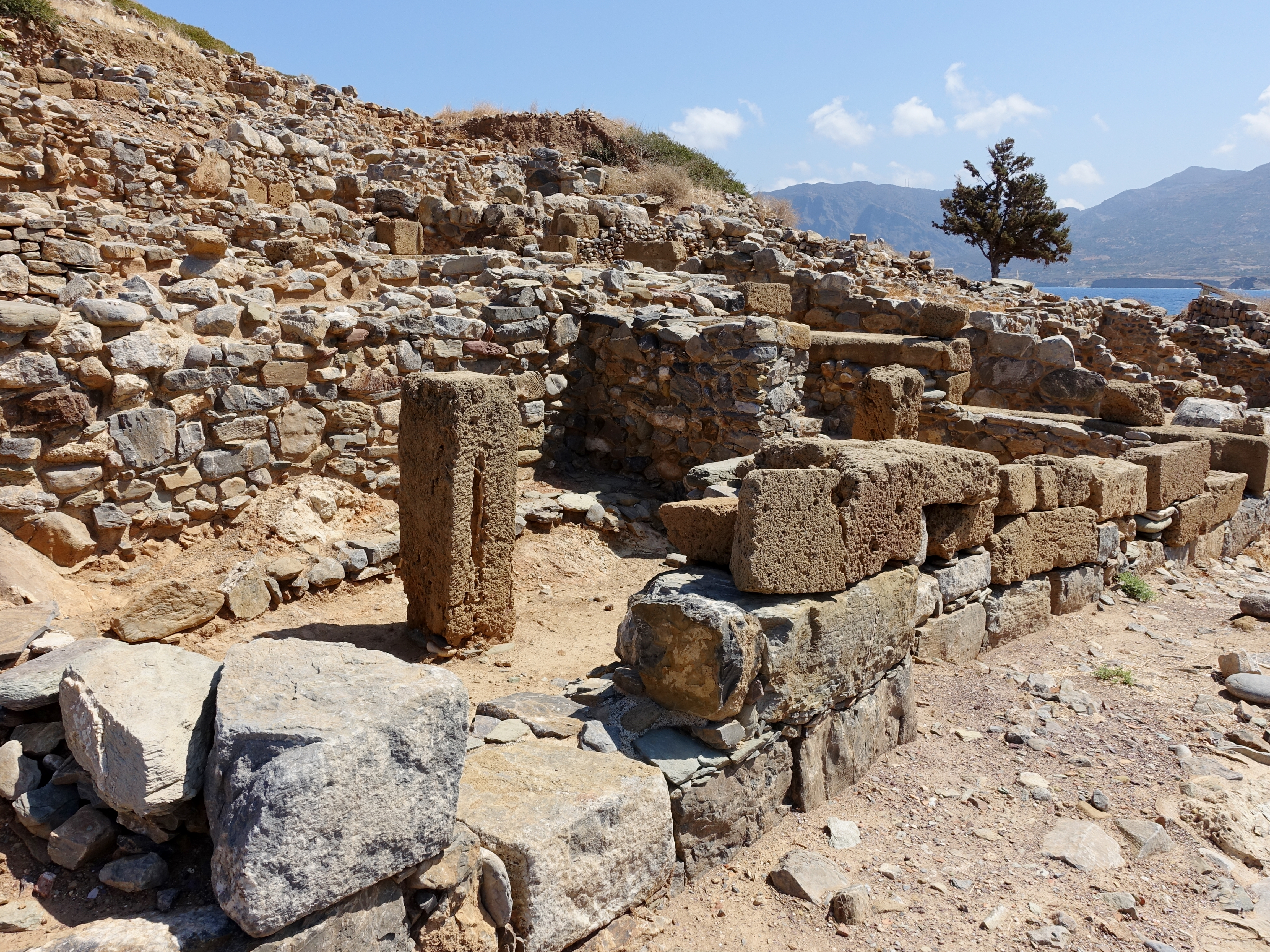 Ausgrabungsstätte auf der Insel Agios Nikolaos (Άγιος Νικόλαος) vor Mochlos (Μόχλος), Kreta, Griechenland